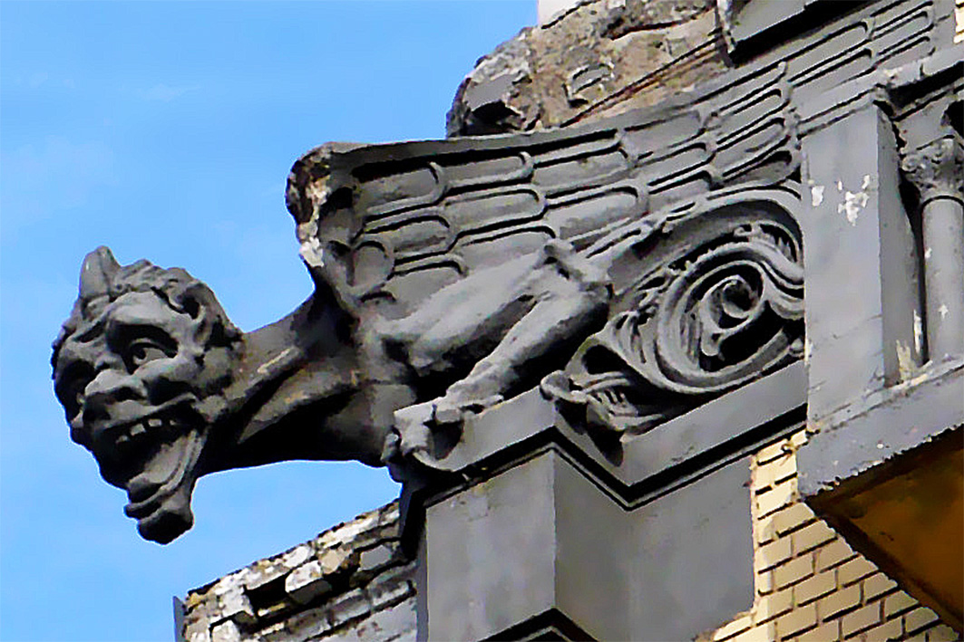 Декор на прибутковому будинку, Київ, вул. Велика Житомирська, 8-А